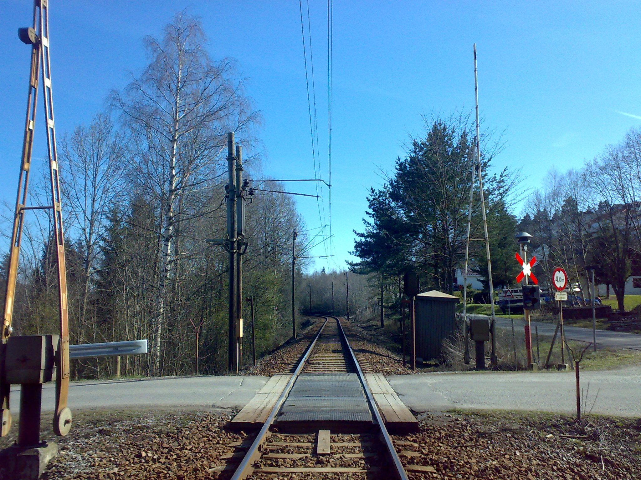 Brevikbanen ved Skjelsvik